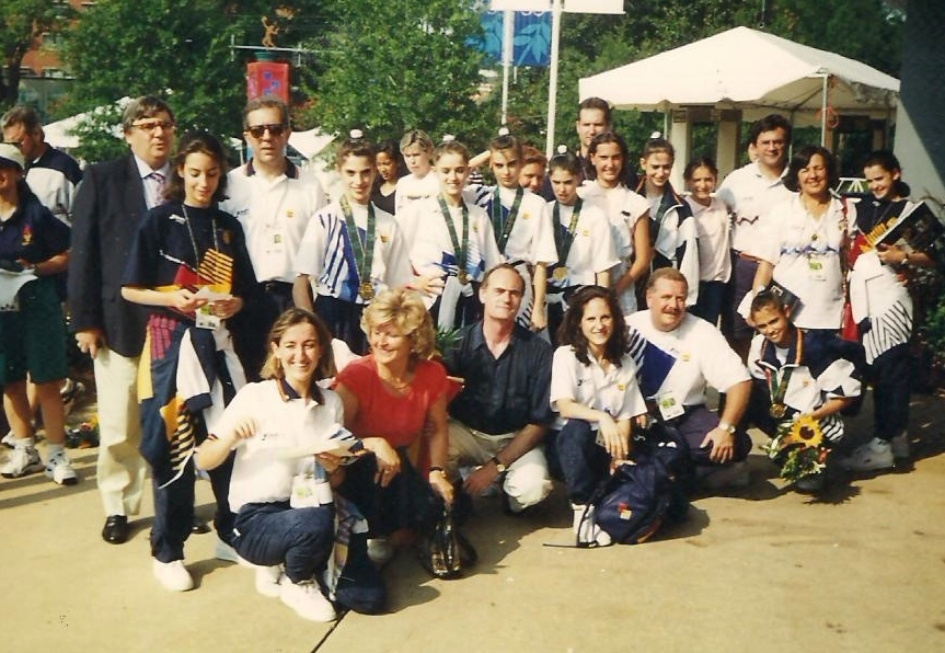 El conjunto español de gimnasia rítmica tras lograr la medalla de oro en los Juegos Olímpicos de Atlanta 1996, junto a otros miembros del equipo y varios directivos. De pie, de izquierda a derecha: Jesús Méndez (presidente de la RFEG), Almudena Cid (gimnasta individual), Pedro Antonio Martín Marín (presidente del CSD), Lorena Guréndez, Nuria Cabanillas, Marta Baldó, Tania Lamarca, Raúl Ruiz (fisio del equipo), Maider Esparza (gimnasta suplente del conjunto), Estíbaliz Martínez, Esther Domínguez (gimnasta individual), Luis González Lago (médico del equipo), Emilia Boneva (seleccionadora nacional) y Alba Caride (gimnasta individual). Sentados, de izquierda a derecha: María Fernández (entrenadora del conjunto), la madre y el padre de Lorena Guréndez, Marisa Mateo (coreógrafa del conjunto), Eduardo Jiménez (técnico del CSD) y Estela Giménez.